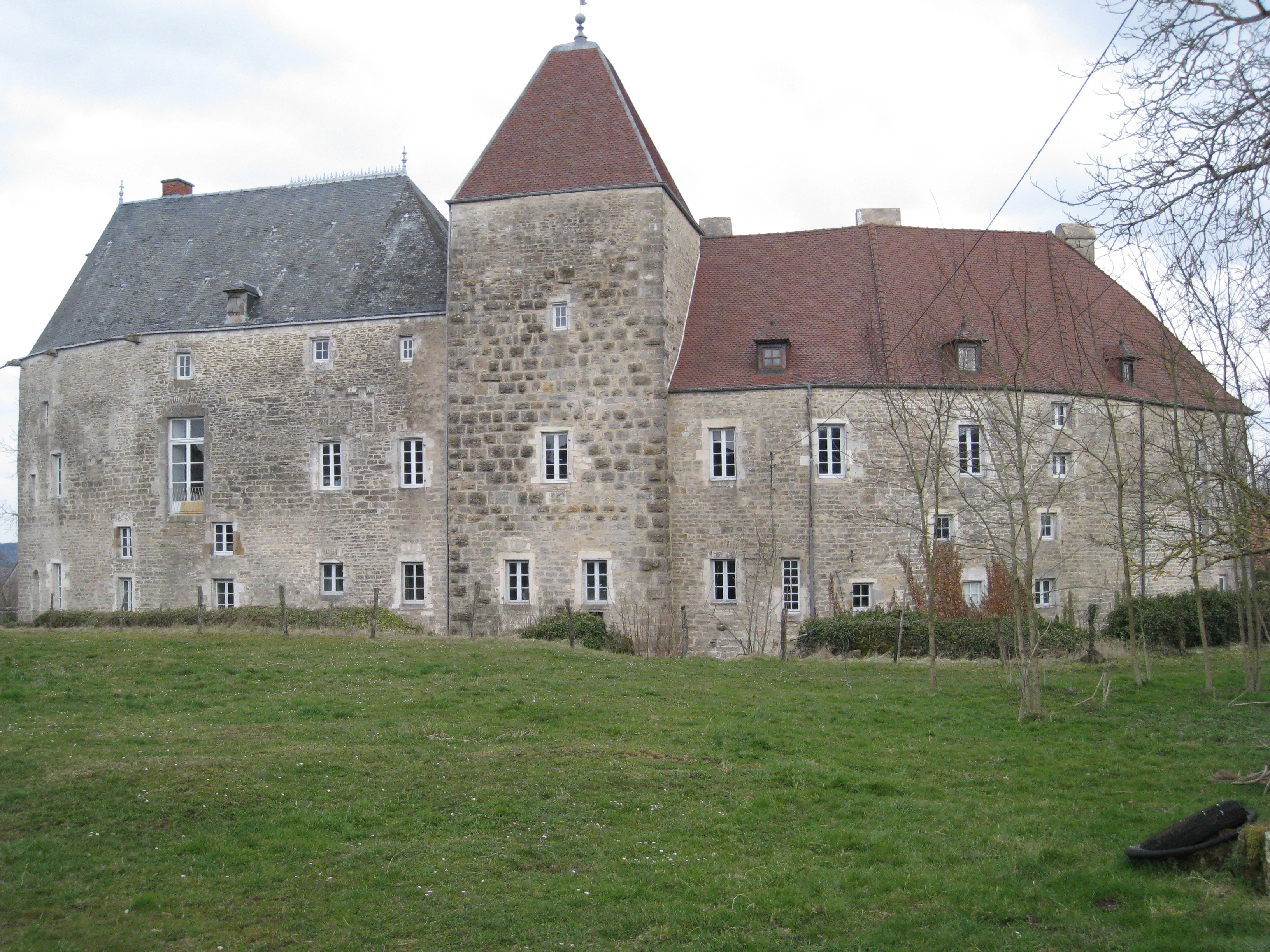 Façade du château de Chalancey, département de la Haute-Marne, région de Champagne-Ardennes, France